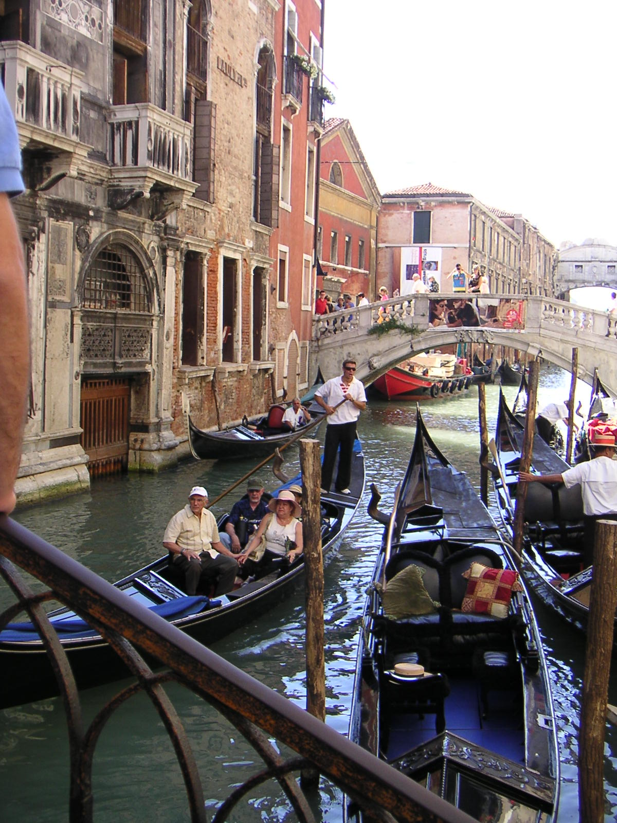 rio canonica venise